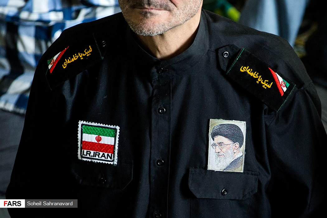 حمیدرضا احمدآبادی